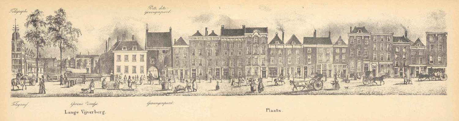 Gevangenpoort en Sociëteit Plaats Royaal in Den Haag